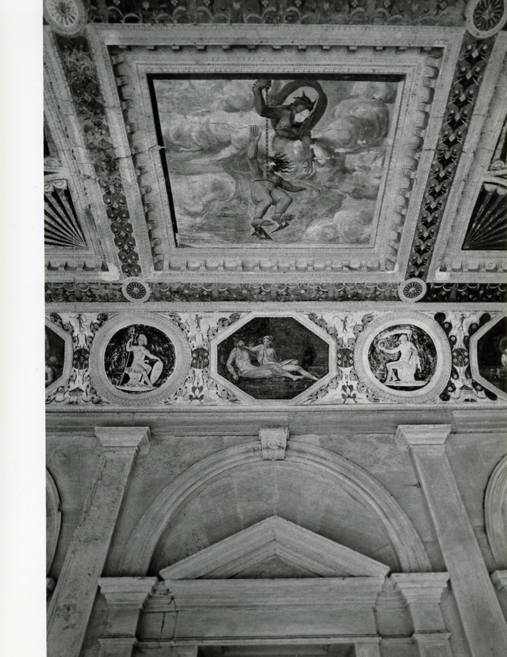 Servizio fotografico : Padova, 1967 / Paolo Monti. - Stampe: 3 : Positivo b/n, gelatina bromuro d'argento/ carta, 18x24. - ((Al verso delle stampe manoscritti i numeri dei negativi corrispondenti (formato 35 mm): 398; iscrizioni didascaliche manoscritte a matita: "Porticato della/ Loggia Cornaro", "Dipinti del portico/ della Loggia Cornaro"; timbro a inchiostro con copyright: "© - Credit to:/ Paolo Monti/ Via T. Tasso [...]/ Milano [...]". - Sul coperchio della scatola iscrizione didascalica manoscritta a pennarello nero: "Bologna/ Città storiche". - Occasione: Documentazione per la pubblicazione: Diego Valeri (a cura di), "Padova: i secoli, le ore", Bologna, Edizioni Alfa, 1967. - Fonte: Monografia di Valeri Diego (a cura di): Padova: i secoli, le ore, Bologna, Edizioni Alfa (1967). - Fonte: Agenda di Paolo Monti: Monti/ 3 aprile 1966 - 9 marzo 1971/ 12421-16823 (1966-1971), presso Archivio Paolo Monti